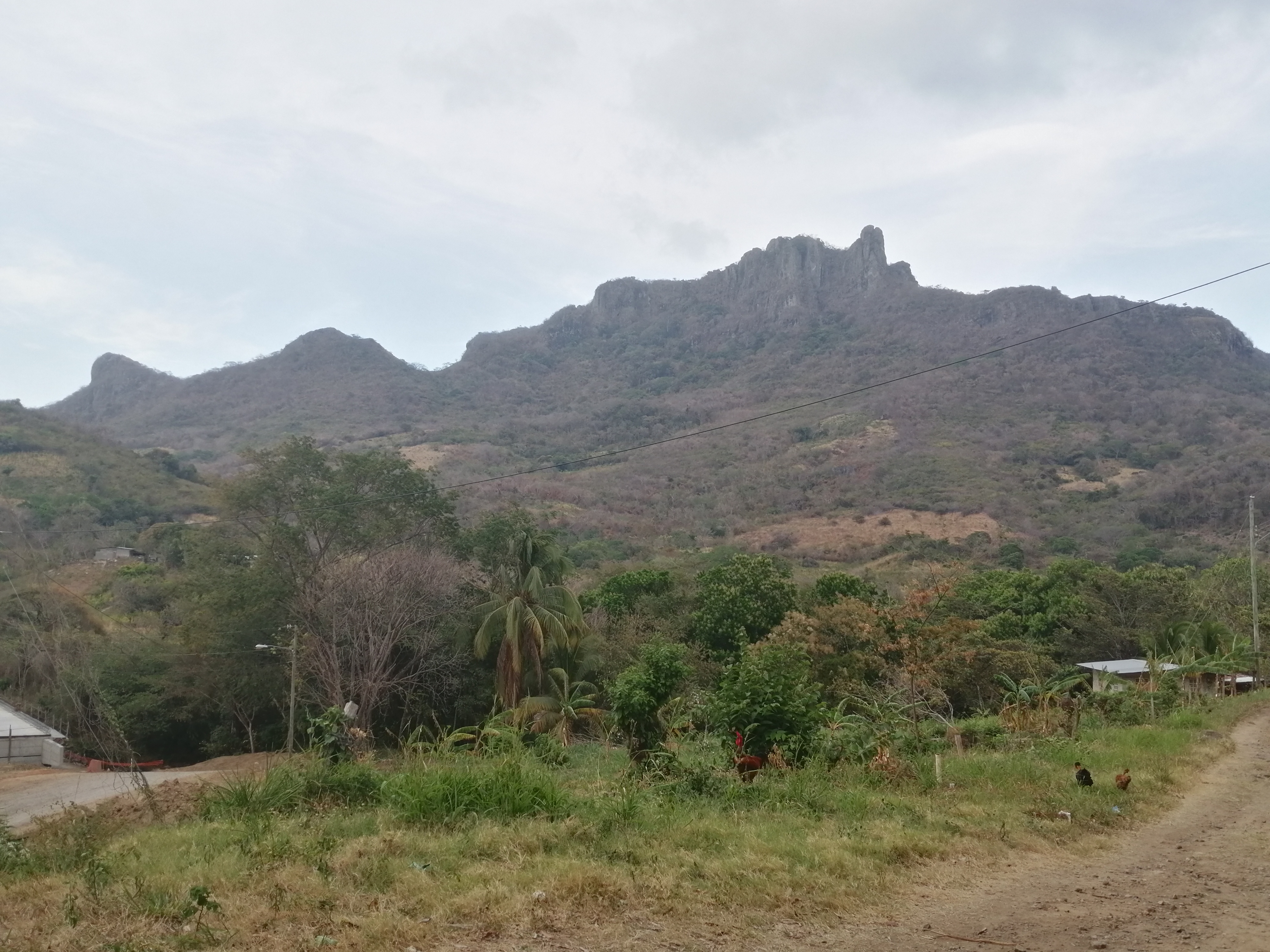 Vista al cerro picacho